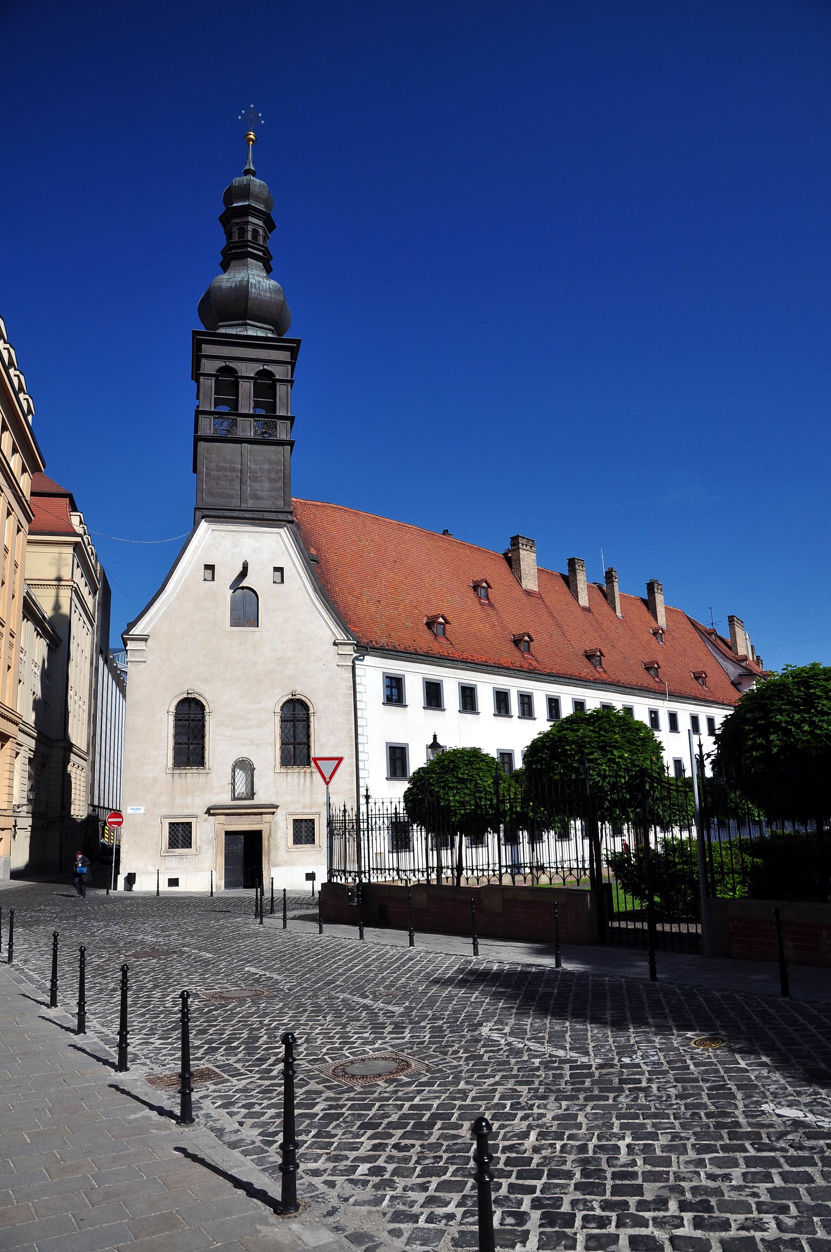 Bratislava, kostol Loretánskej Panny Márie, Slovensko